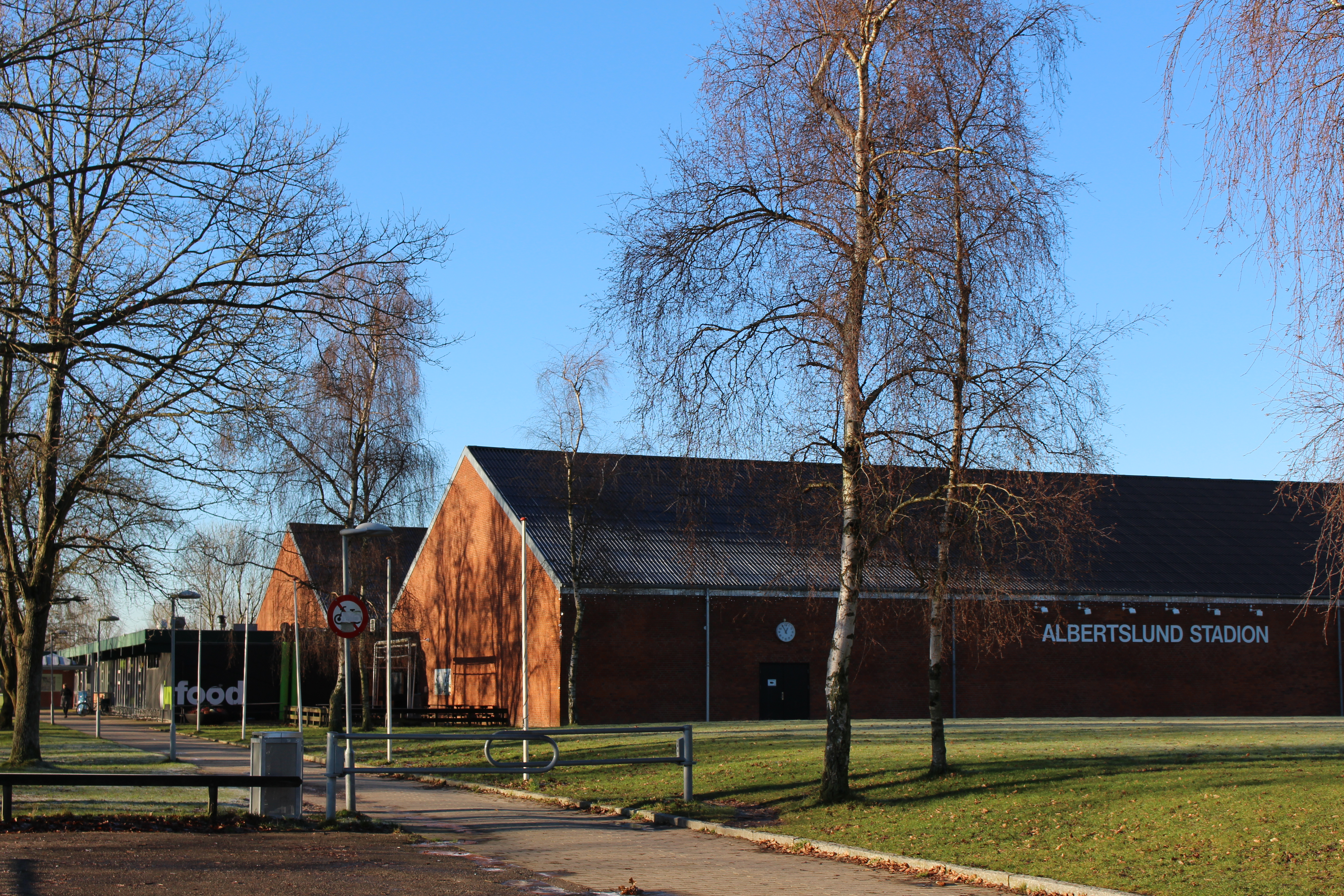 Hallerne på Albertslund Stadion